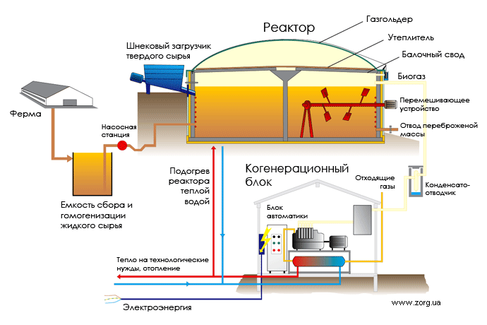 Biogas plant scheme